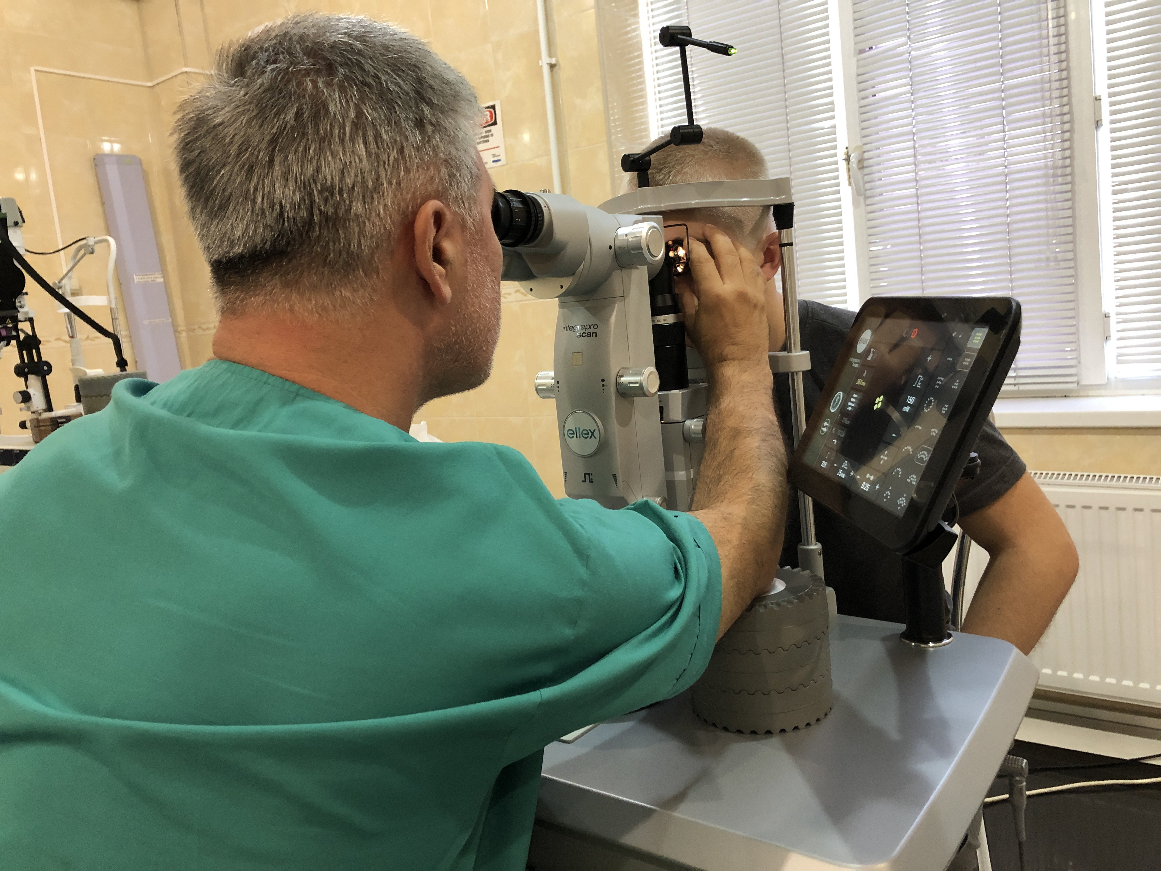 Выполнение транспупиллярной коагуляции с использованием линзы на лазере, встроенном в щелевую лампу